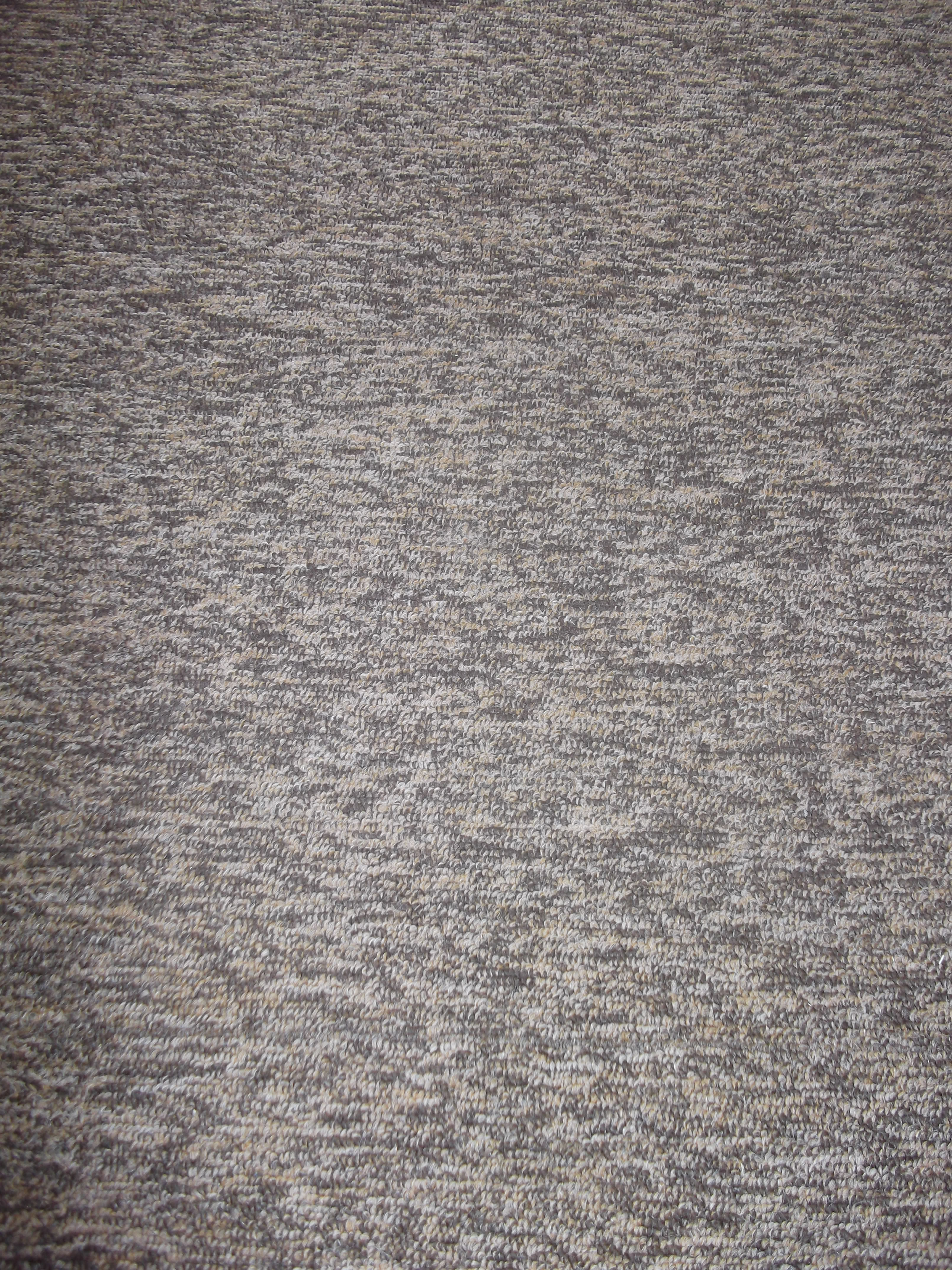 Textura